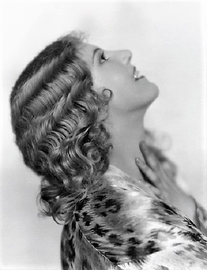 Ena Gregory